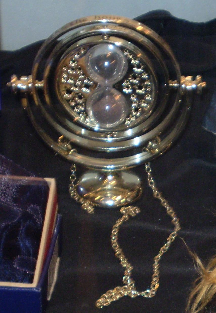 Giratemps.